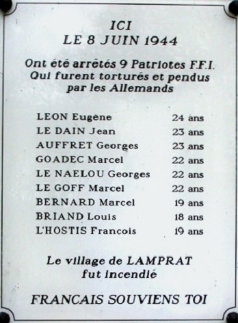 La stèle de Lamprat qui commémore le drame du 8 juin 1944.